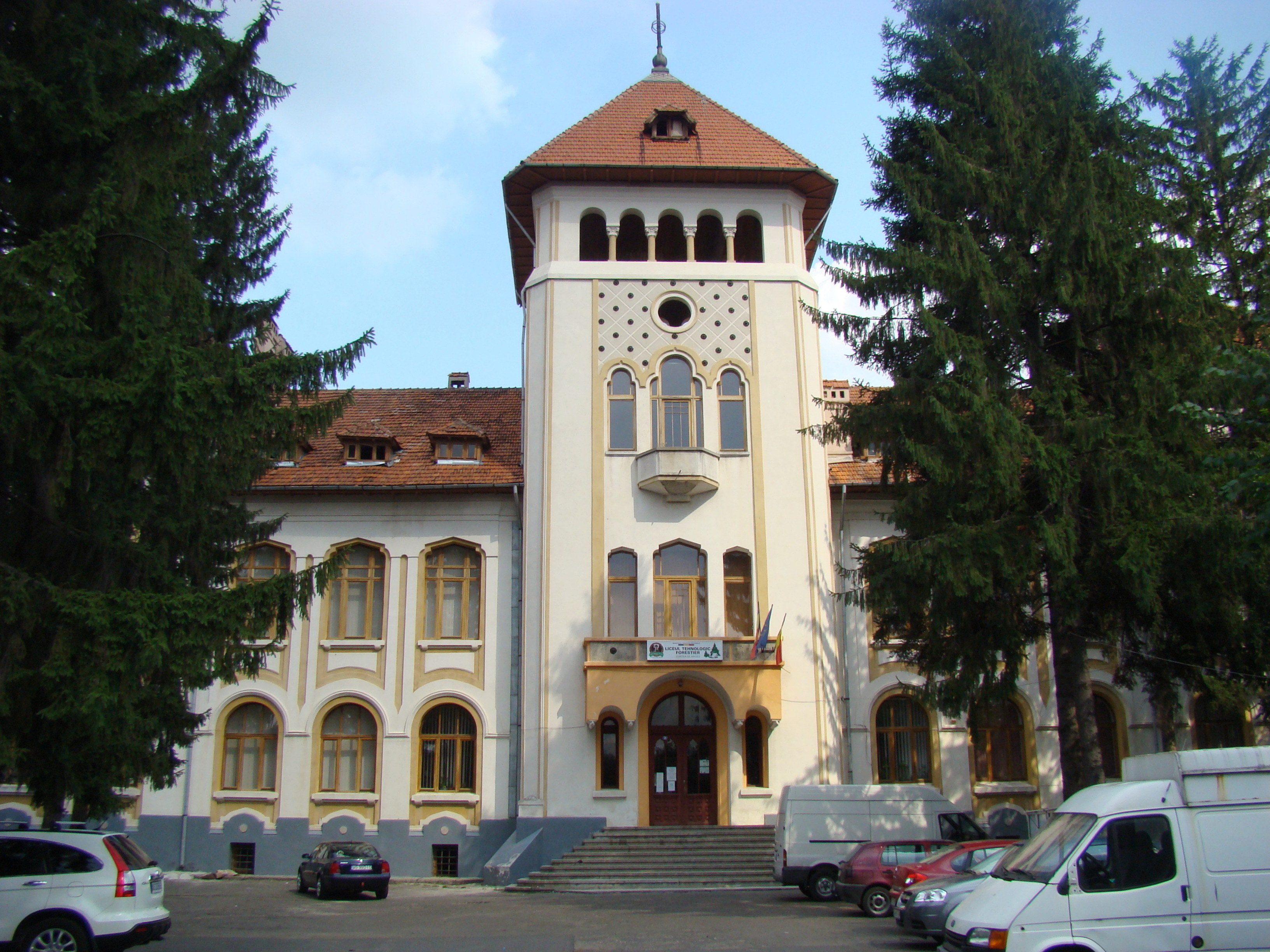 Fostul Seminar Teologic, azi Grup școlar forestier, municipiul Curtea de Argeș, Bd. Basarabilor 21